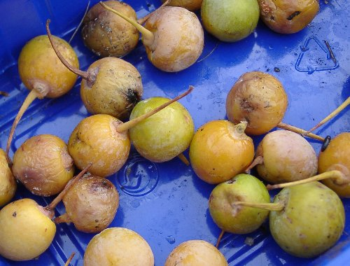 Früchte von Ginkgo biloba; Bild von mir aufgenommen